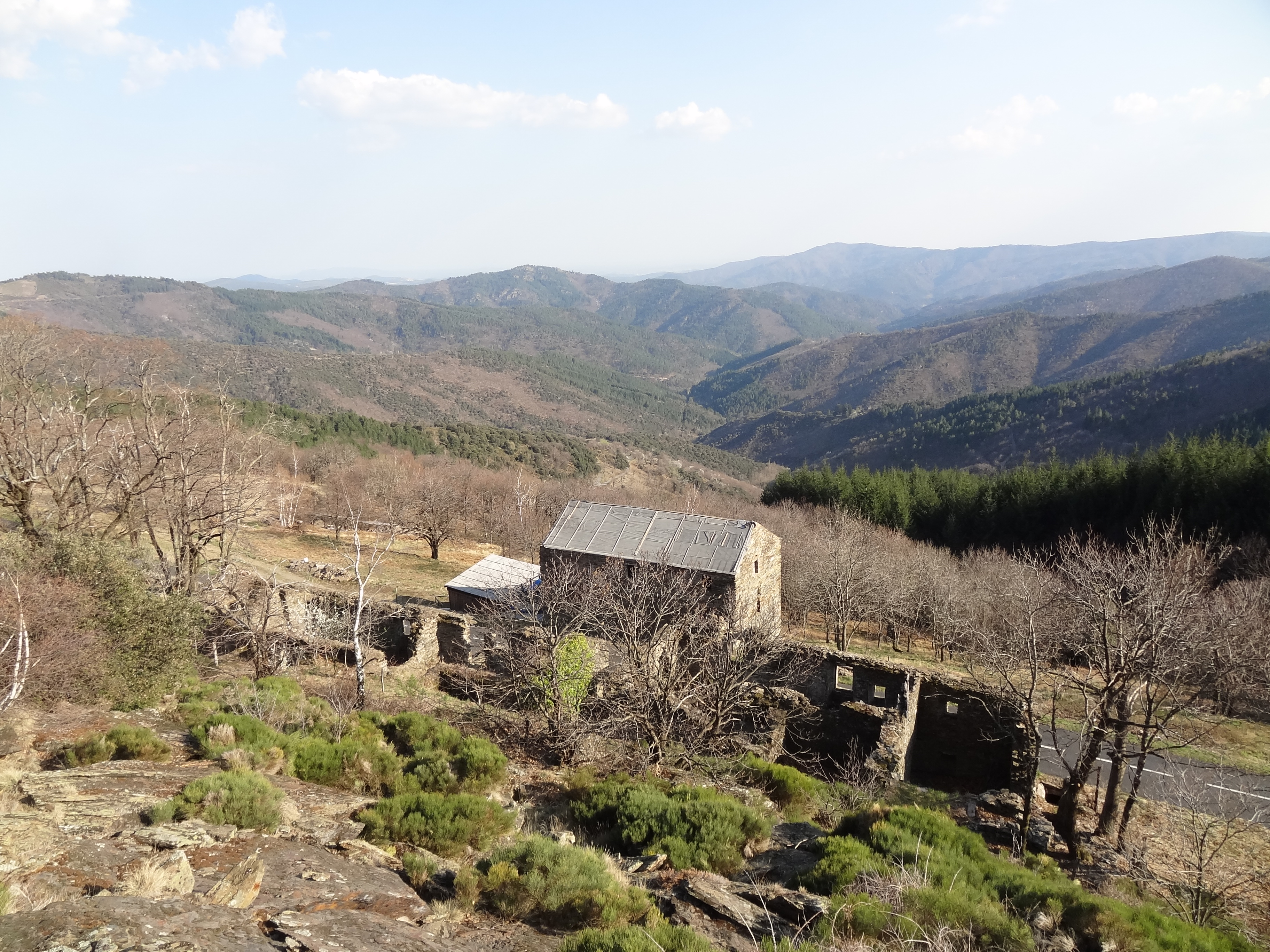 Relais de l'Espinas (Saint-Andéol de Clerguemort) - Route départementale 35 - vue sur le relais au premier plan, sur territoire de St-Andéol au second plan, la montagne du Mortissou au troisième plan